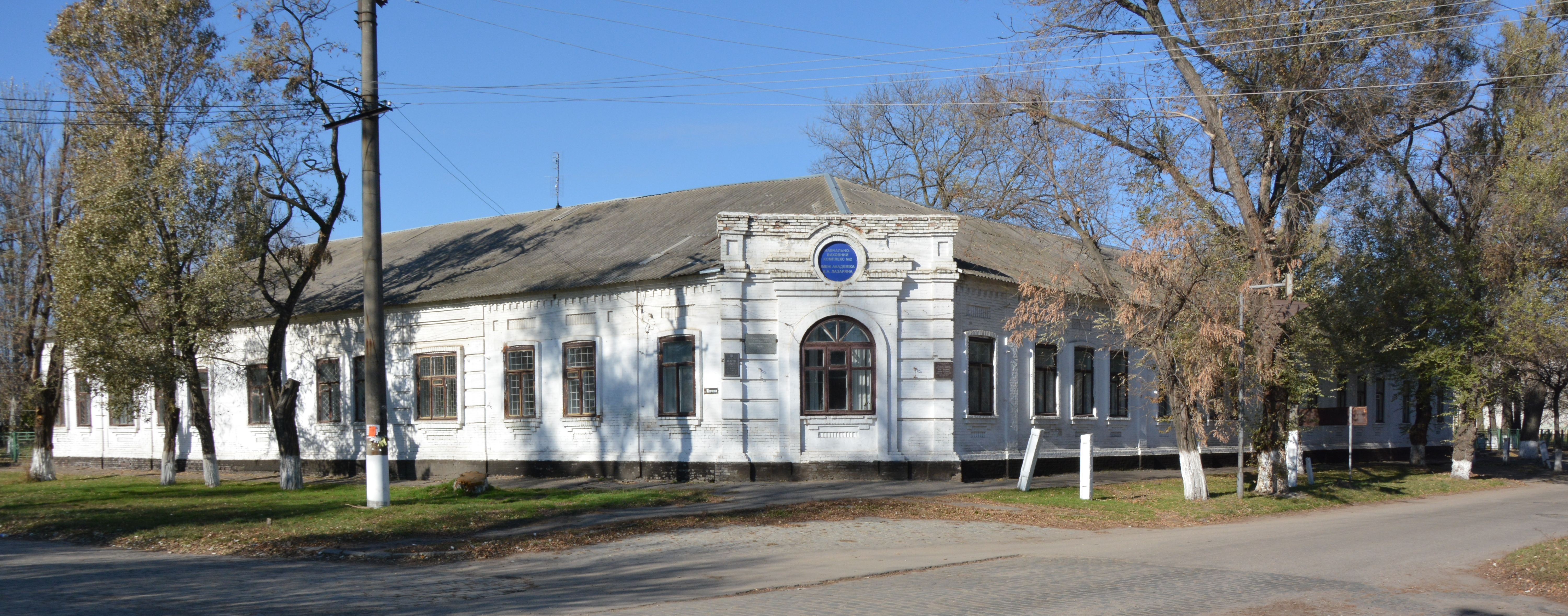 Будинок жіночої гімназії, Оріхів, вул. Шевченка, 16